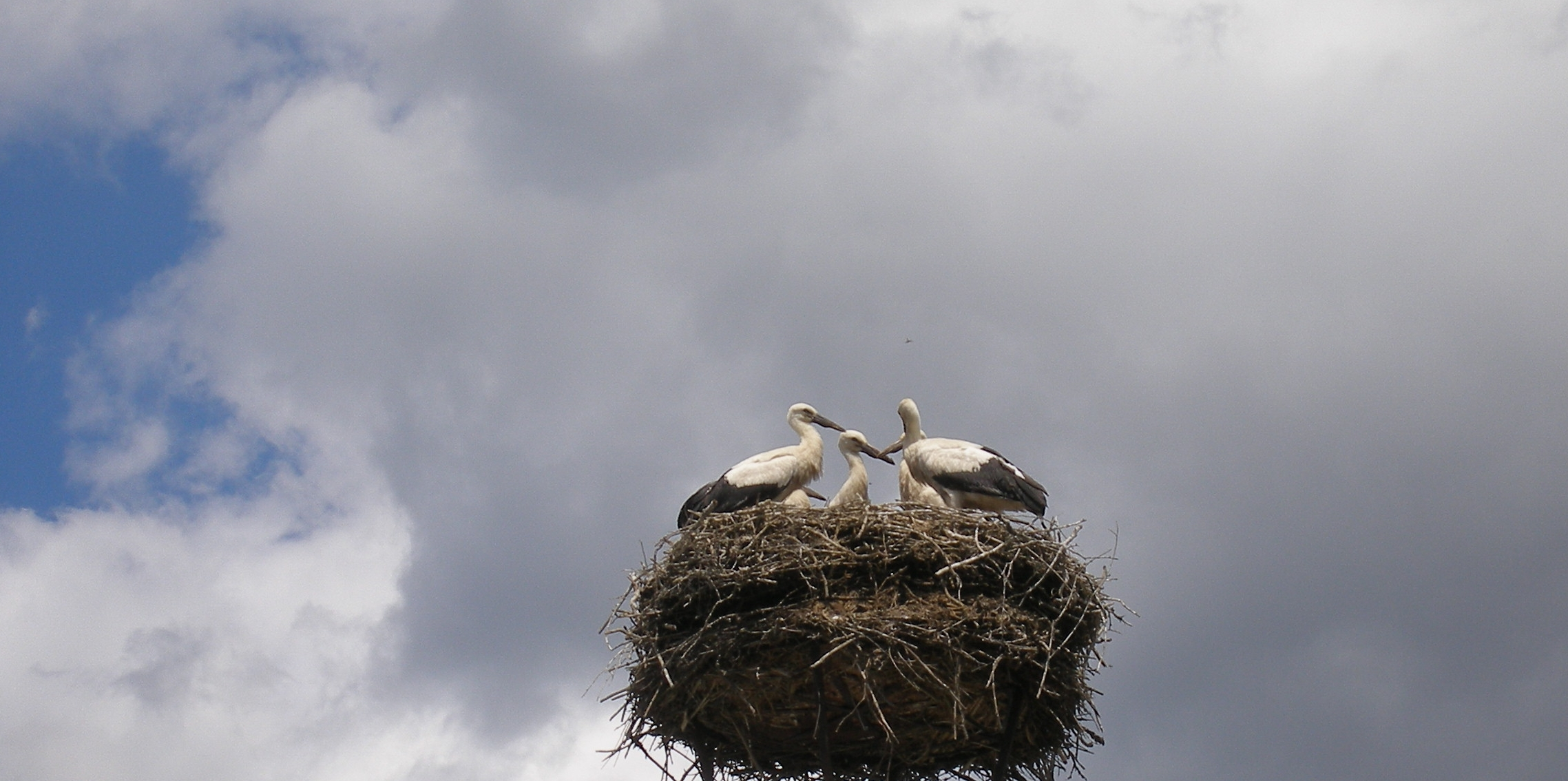 Bocián biely v obci Kojatice, Šarišská vrchovina, okr.Prešov, región Šariš